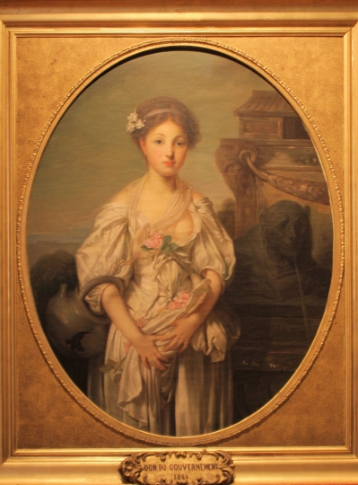 Картина Родольфа Жуліана «Розбитий глек».